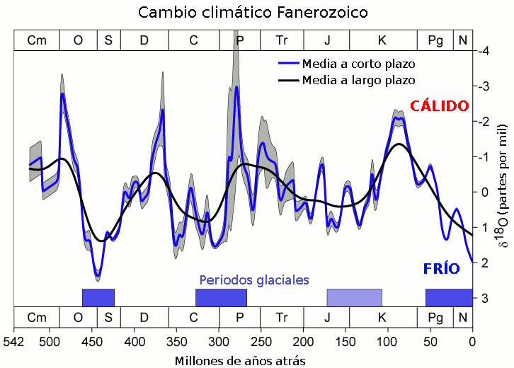 Translation from File:Phanerozoic Climate Change.png